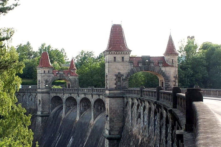 Hráz přehrady Les Království zleva